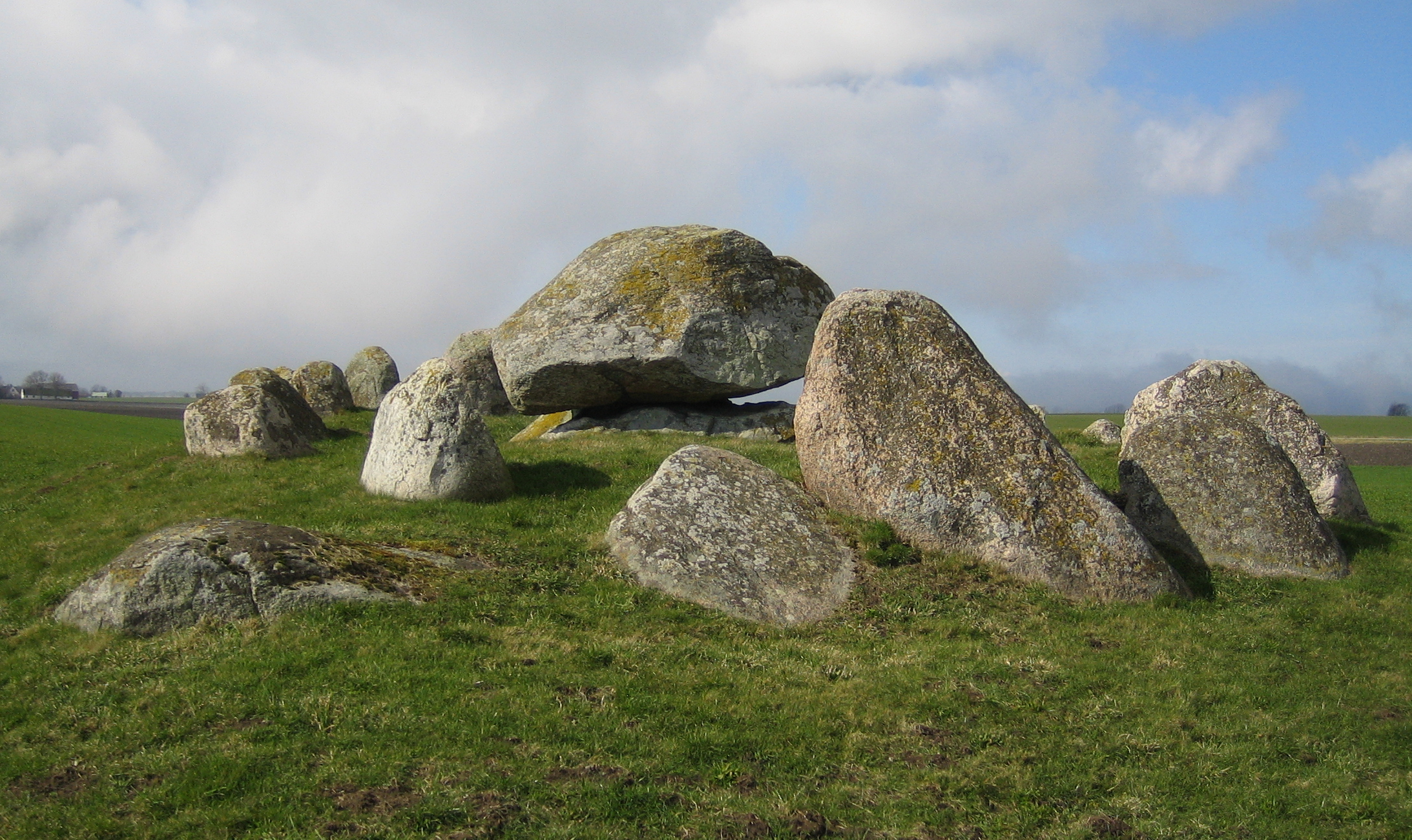 Skegrie megalith grave in Skåne, Sweden